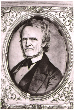 William Lyon Mackenzie